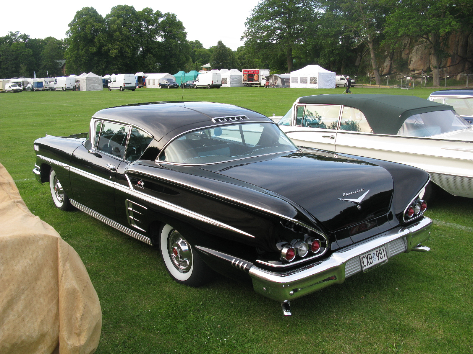 Chevrolet Impala 1958